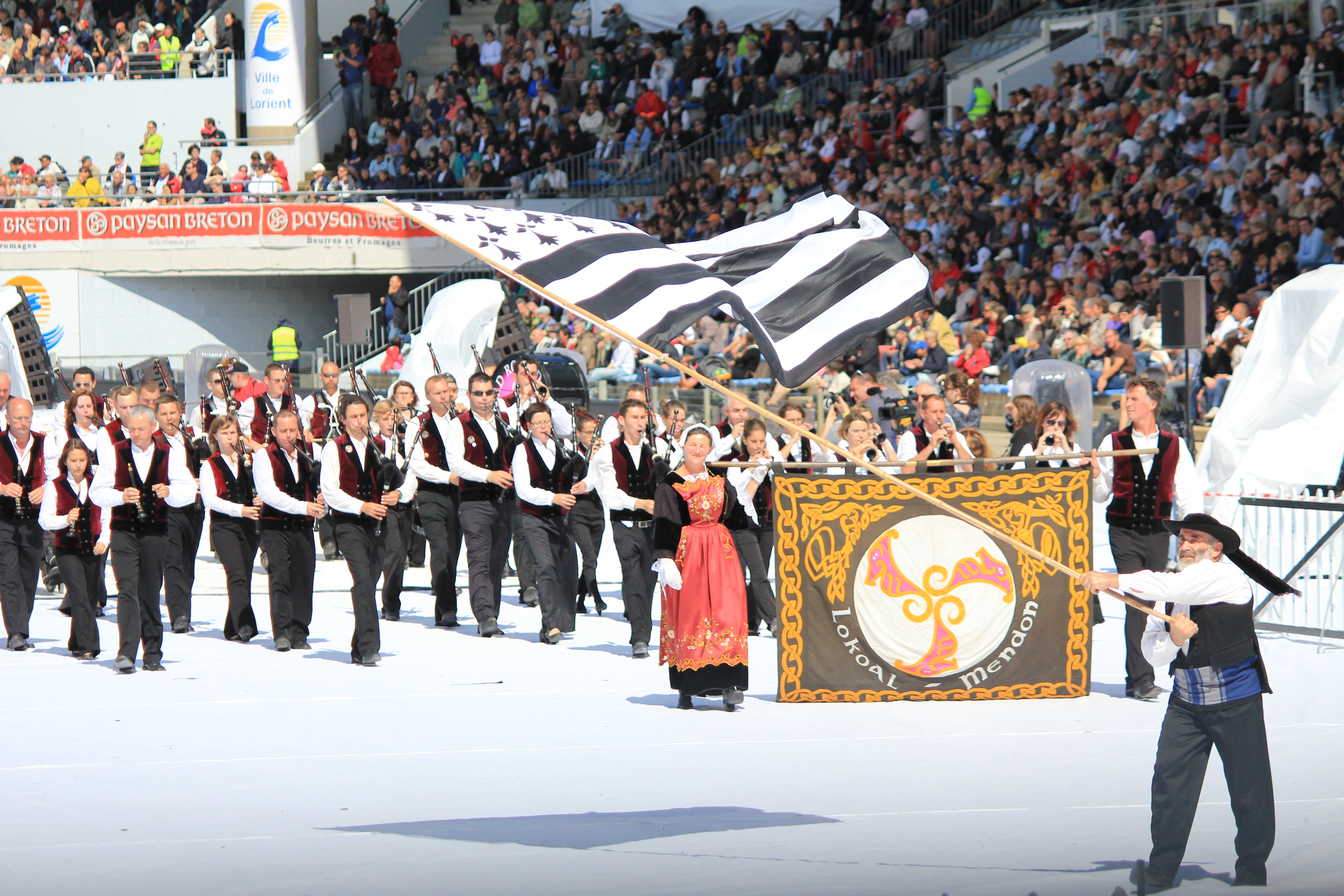 bagad Ronsed-Mor pendant le FIL 2012